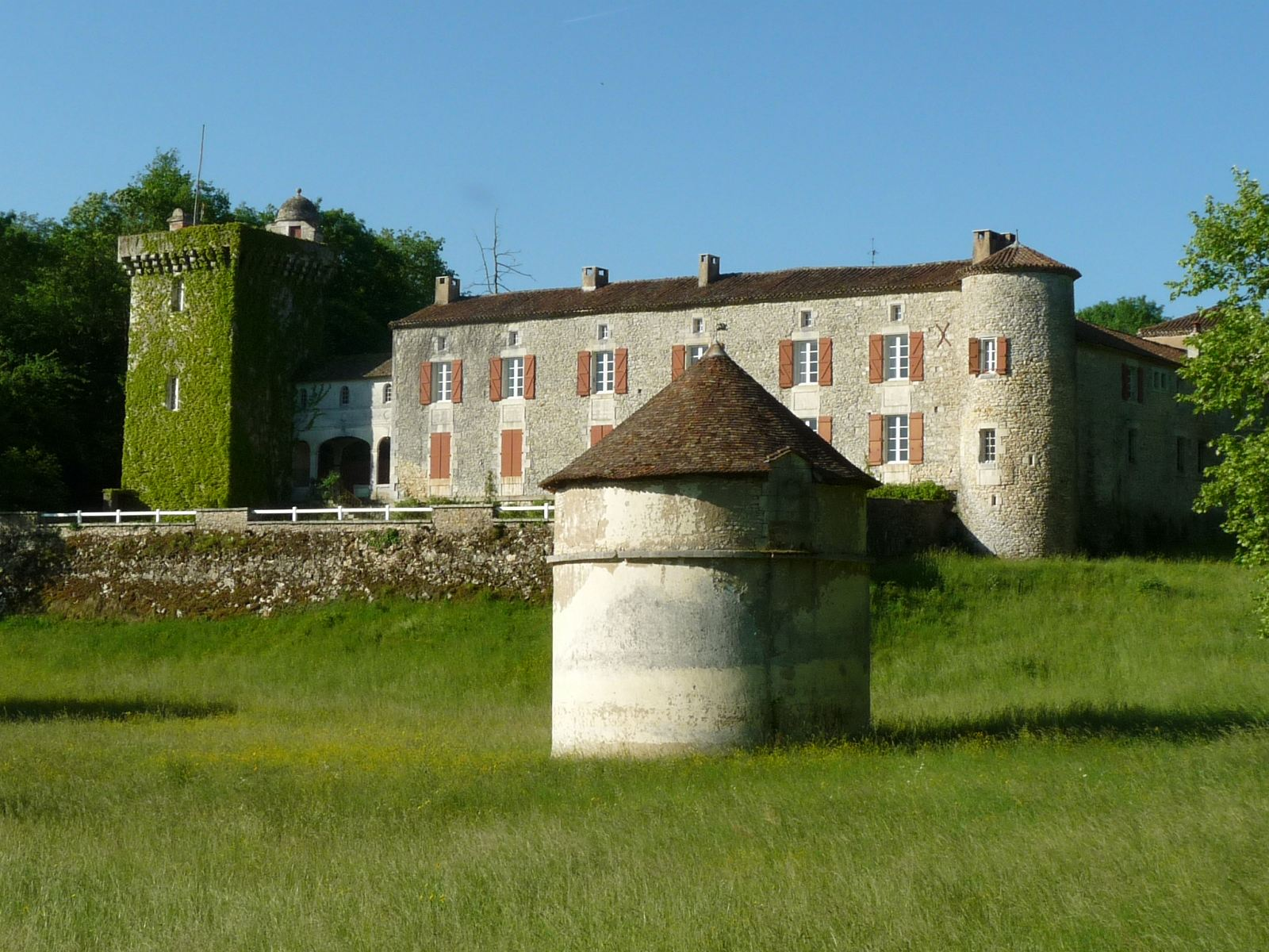 château de Rancogne (Charente, France) vu de la Tardoire